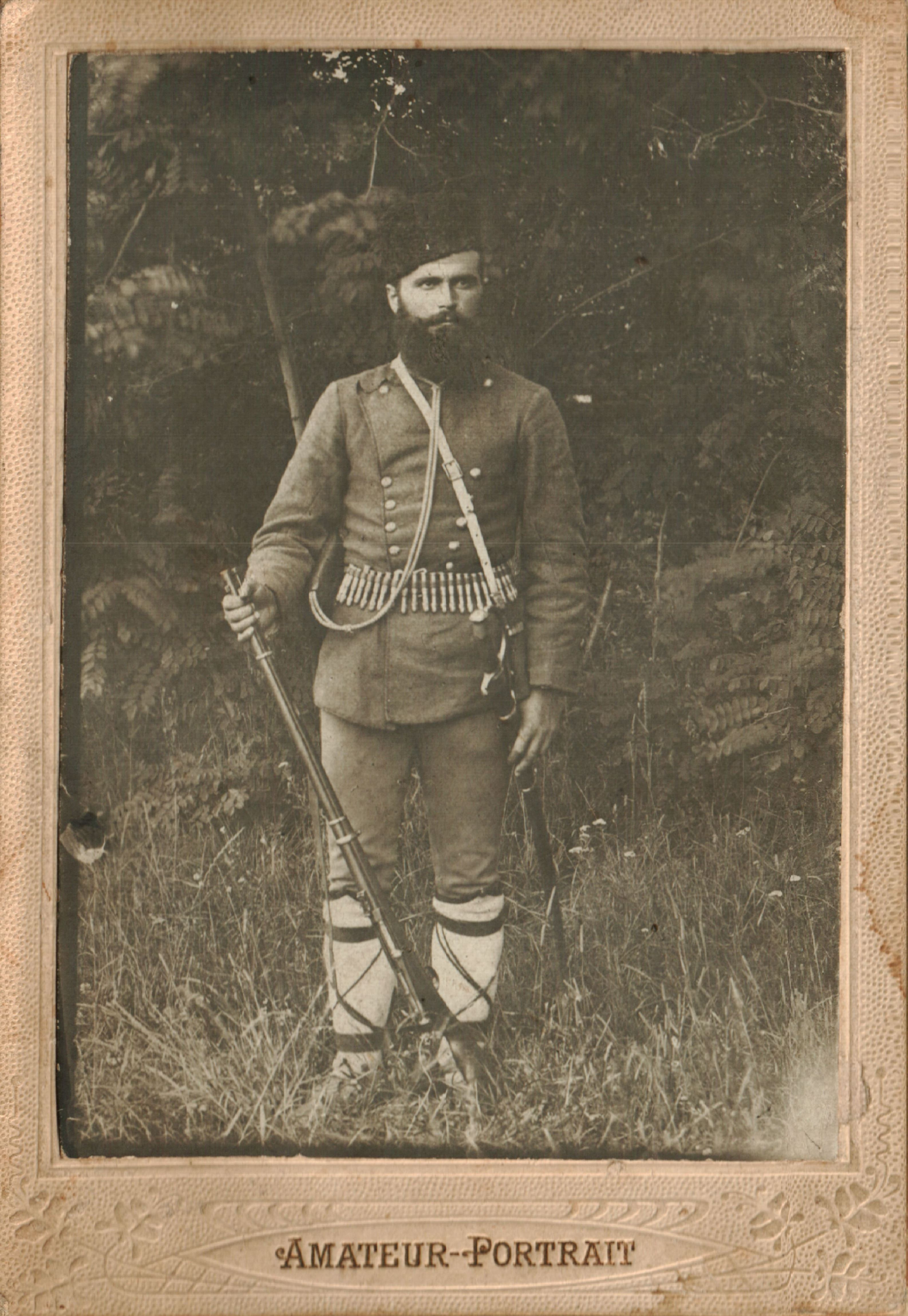 Четникът на ВМОРО Тома Марков Костов от Корча.